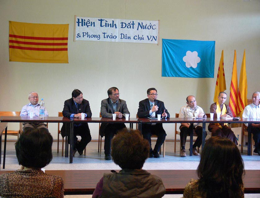 Cờ vàng ba sọc đỏ và cờ Đảng Việt Tân trong hội thảo về hiện tình Việt Nam tại thành phố Krefeld (Đức).